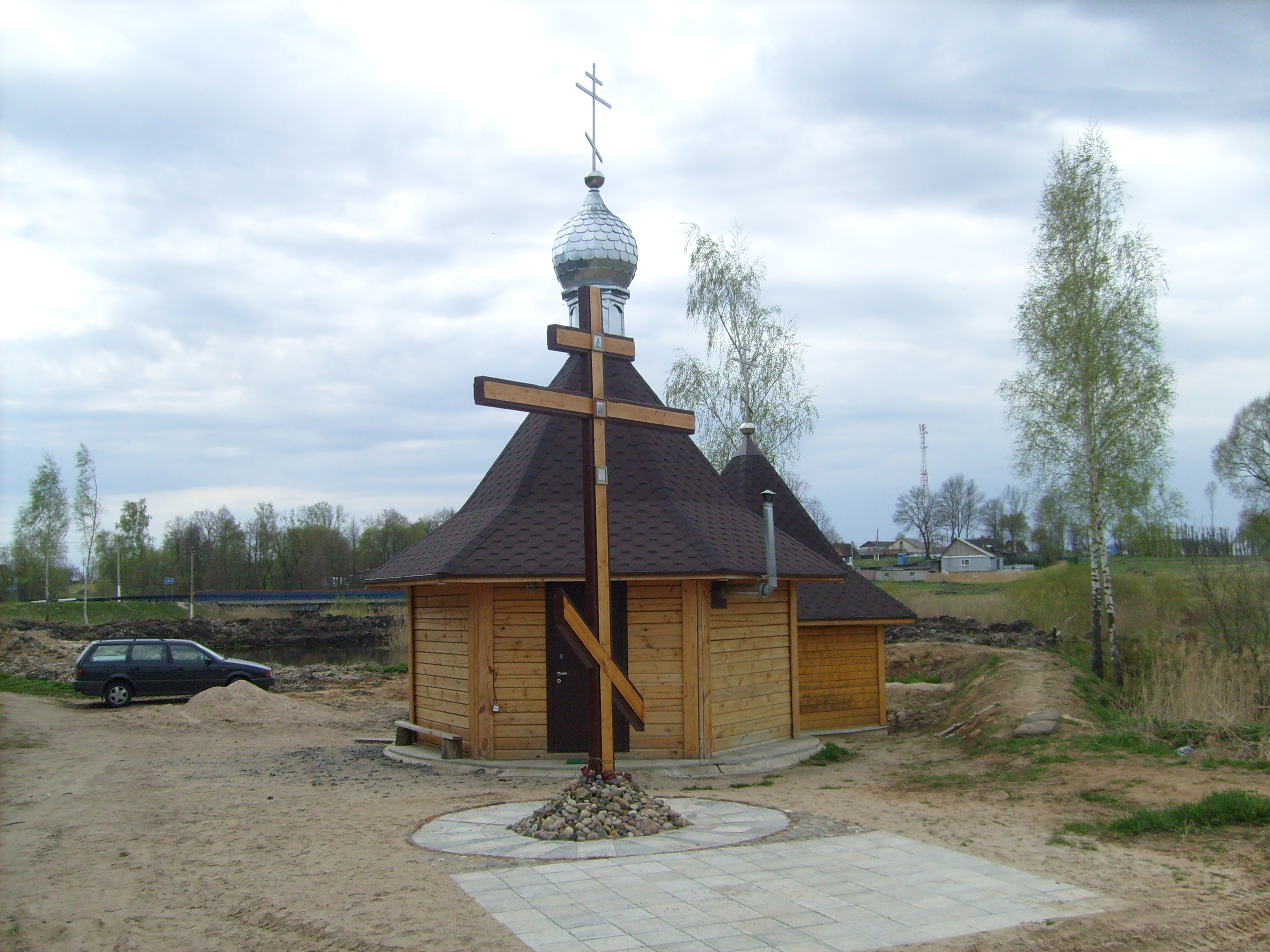 Часовня в агрогородке Сухари